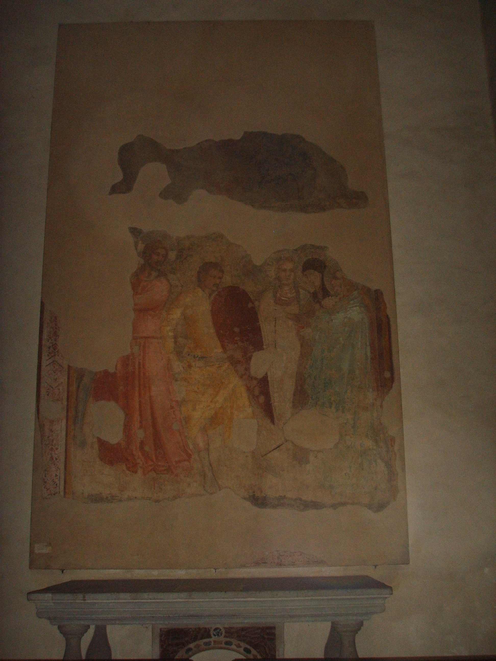 Badia Fiorentina church nardo_di_cione_(attribuzione),_cappella_di_san_bernardo in Florence, italy